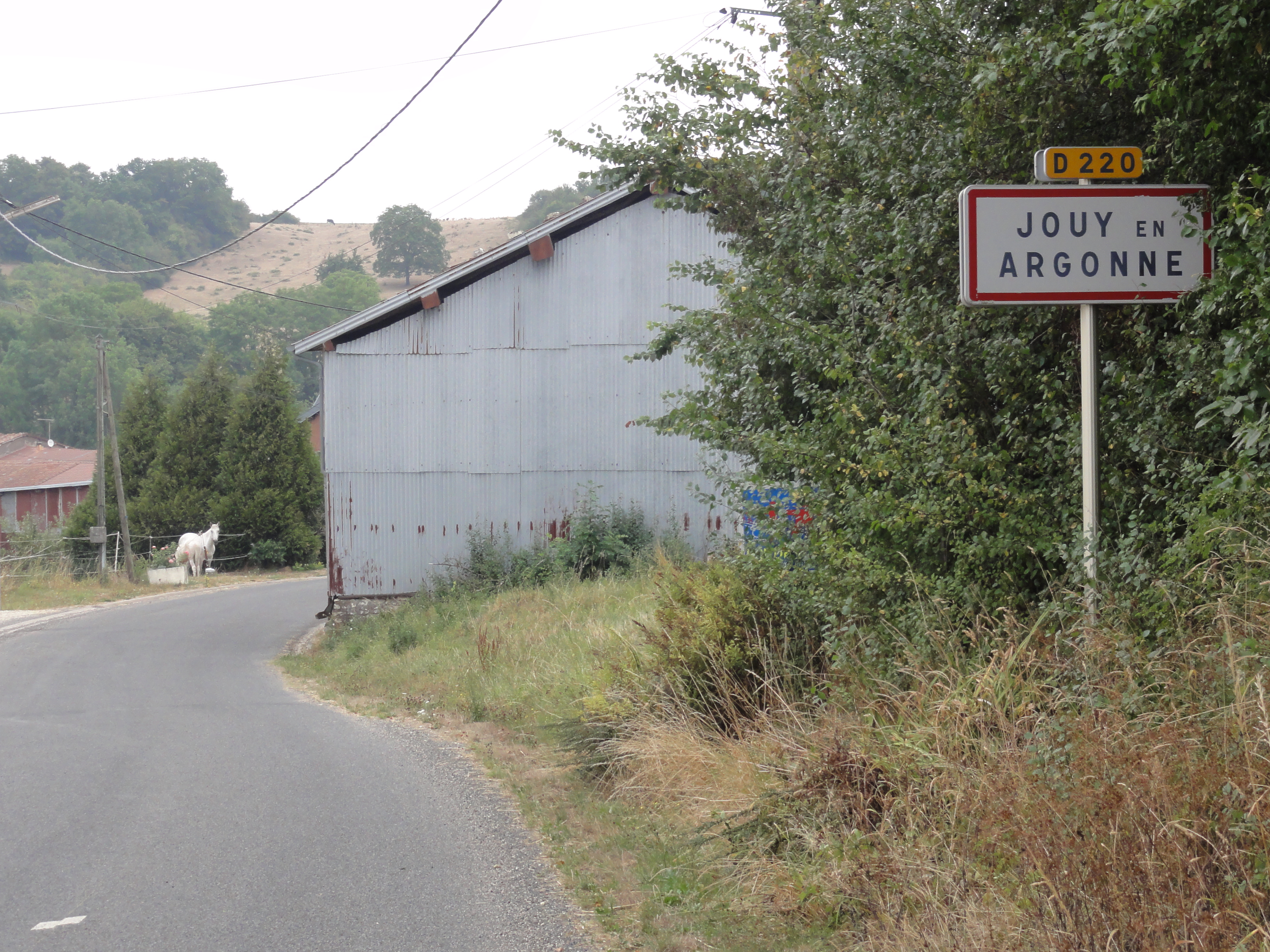 Jouy-en-Argonne (Meuse) city limit sign